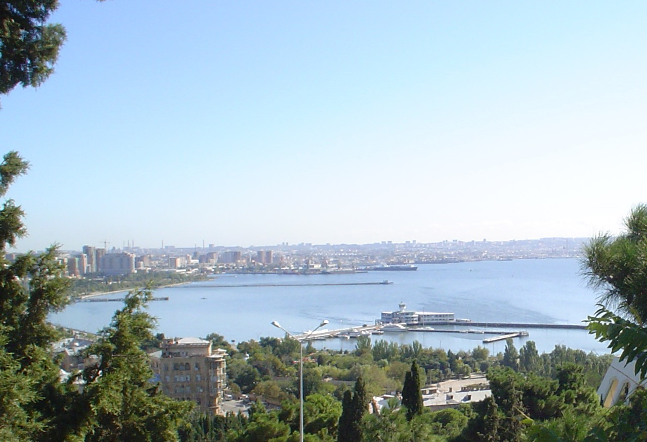 Bay in Baku, Azerbaijan